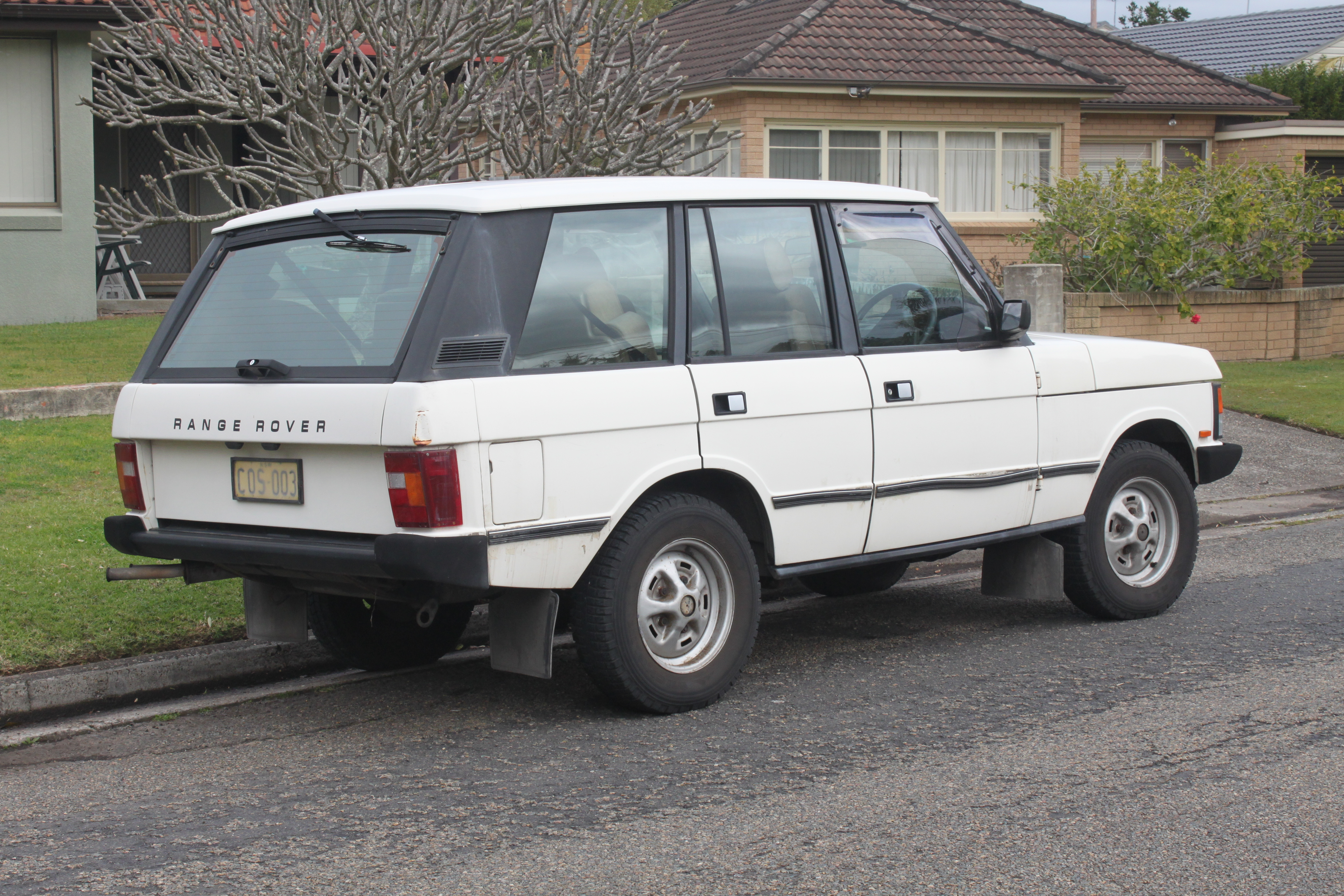 1987 Range Rover